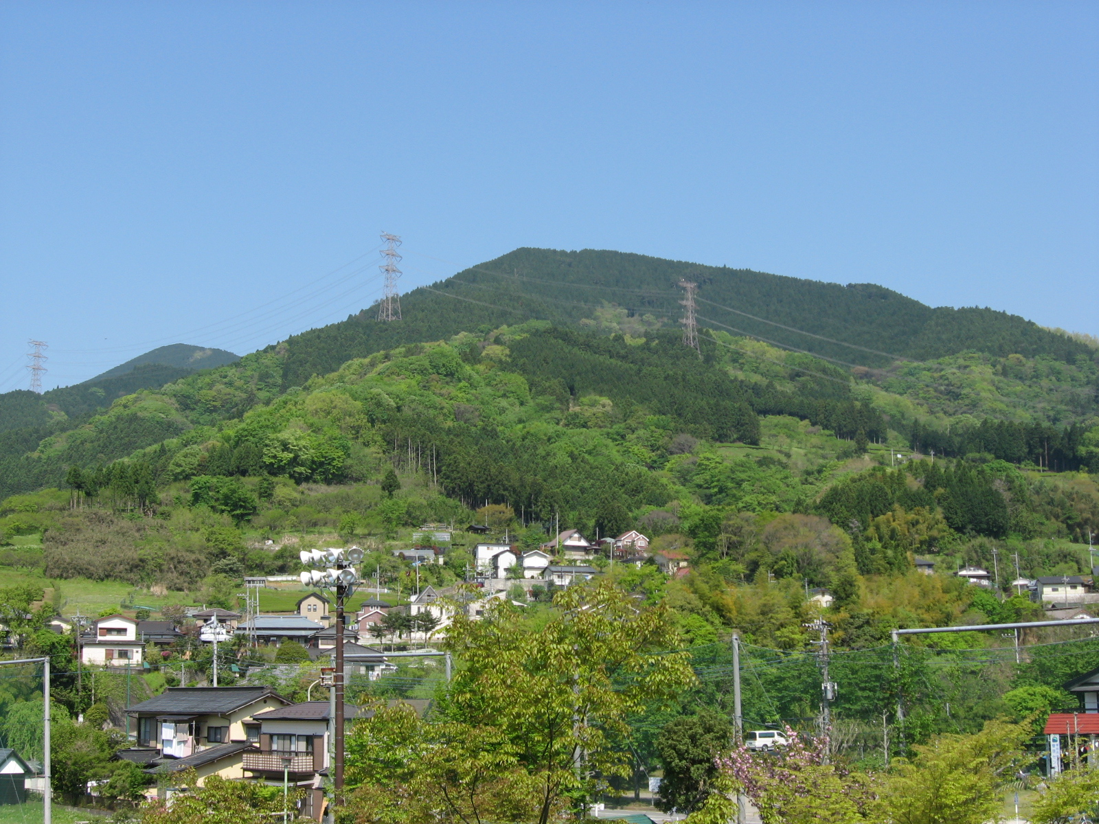 寄よりシダンゴ山